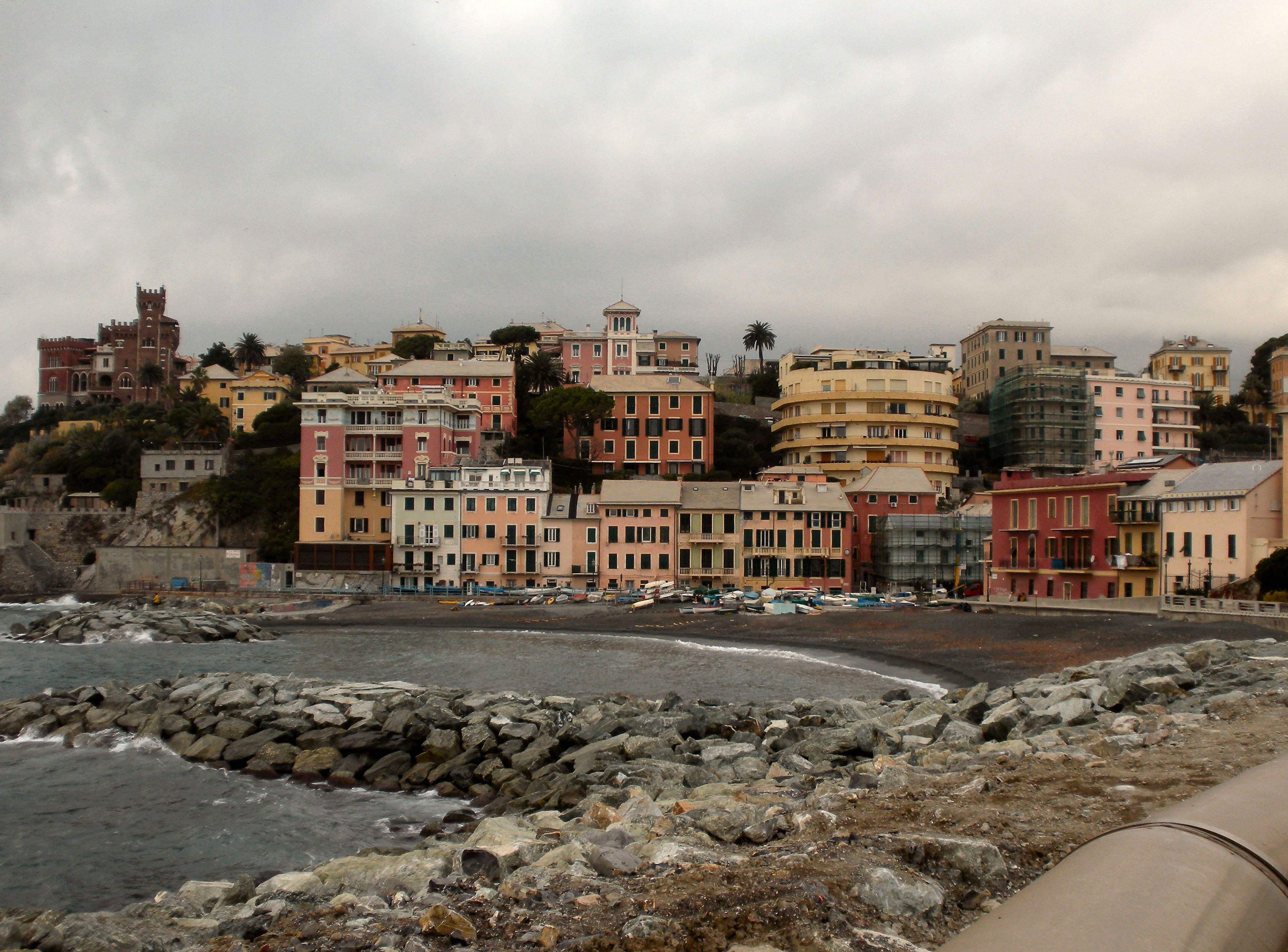 Genova, quartiere di Sturla, veduta del borgo di Vernazzola